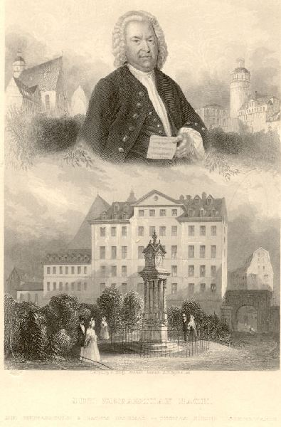 Johann Sebastian Bach, Porträtstich (vor der Thomasschule) von Albert Henry Payne (1812–1902), darunter das Denkmal von der Schule